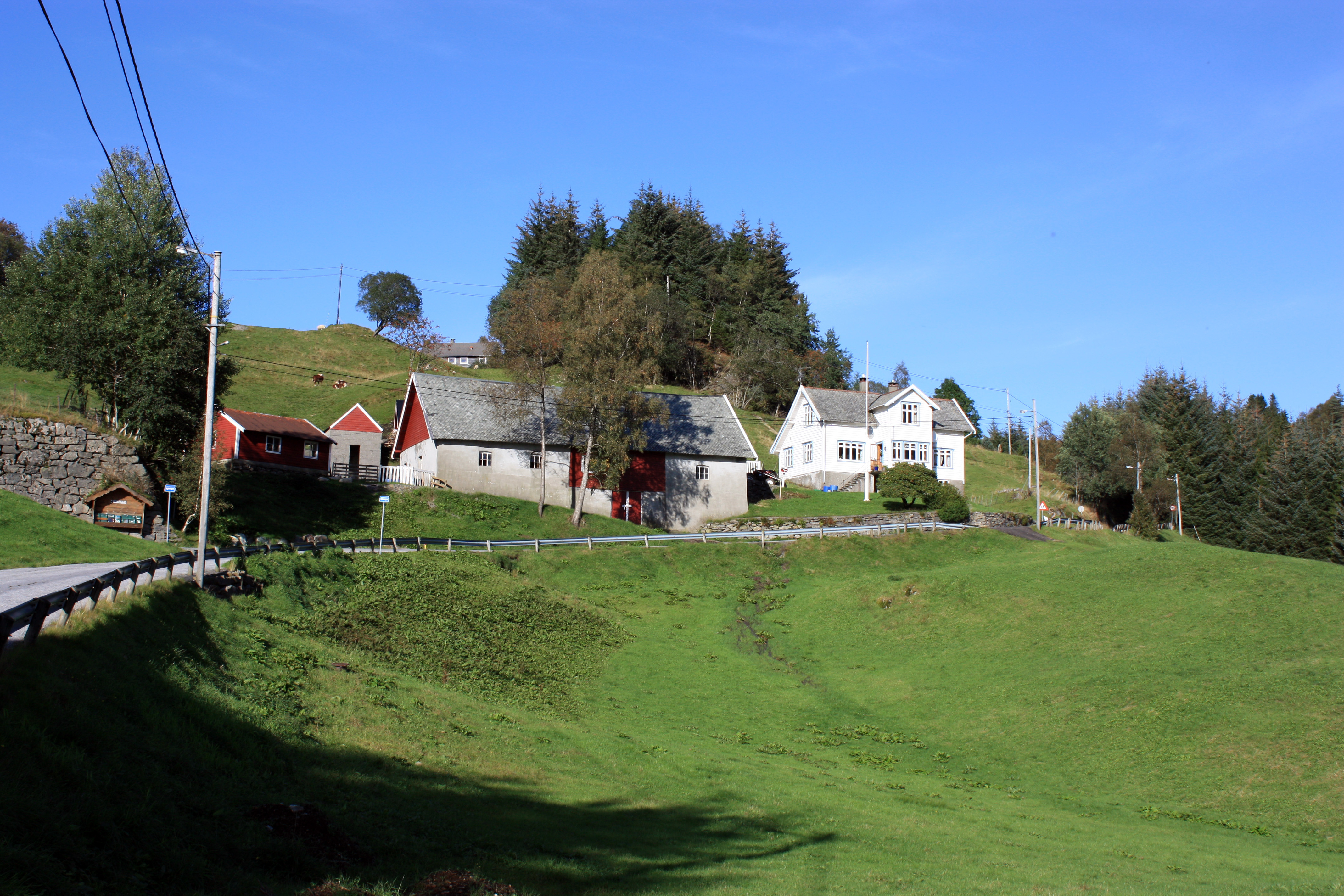 Nedre Totland, Fana, Bergen.